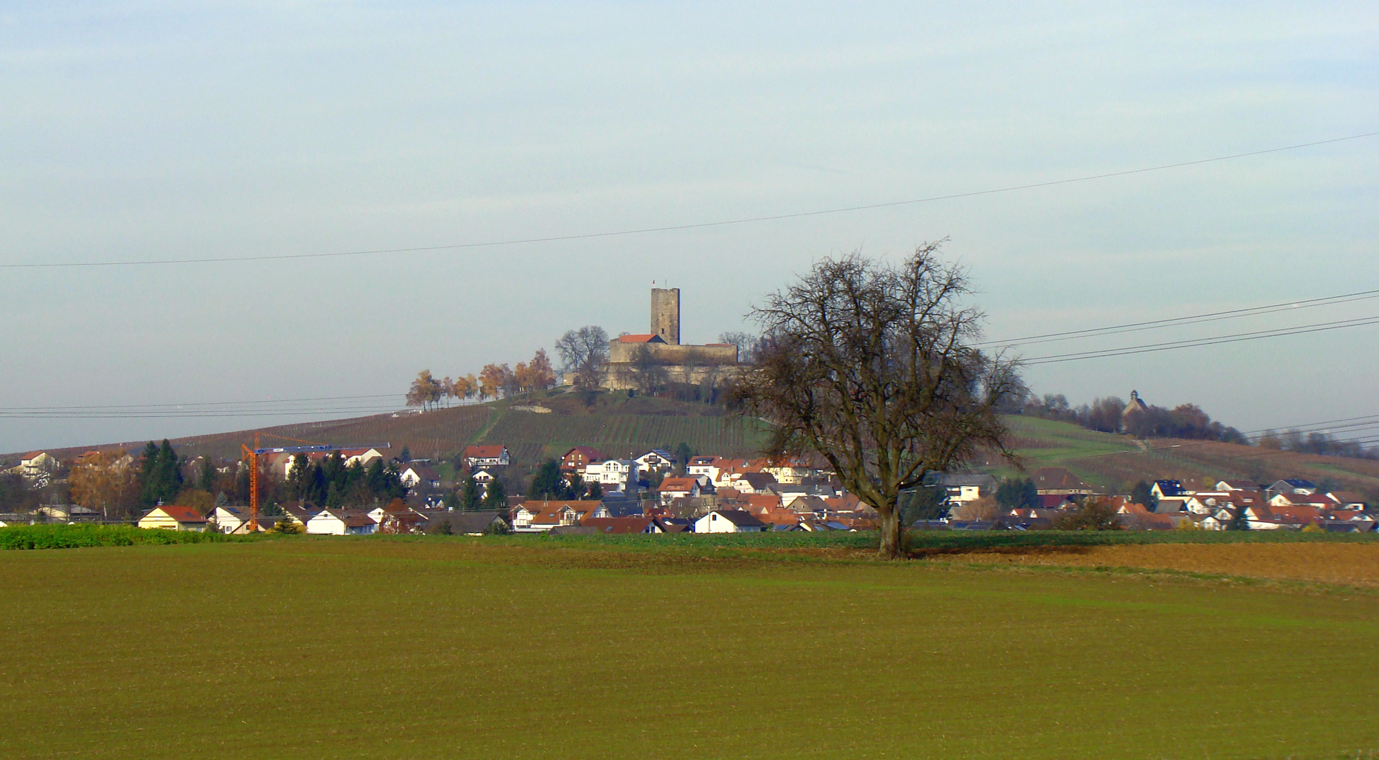 Blick auf Burg Steinsberg von Sinsheim-Hilsbach aus